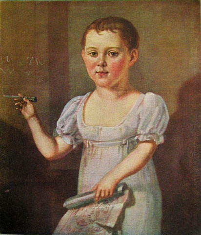 Михаил Юрьевич Лермонтов в возрасте 3-4 лет.